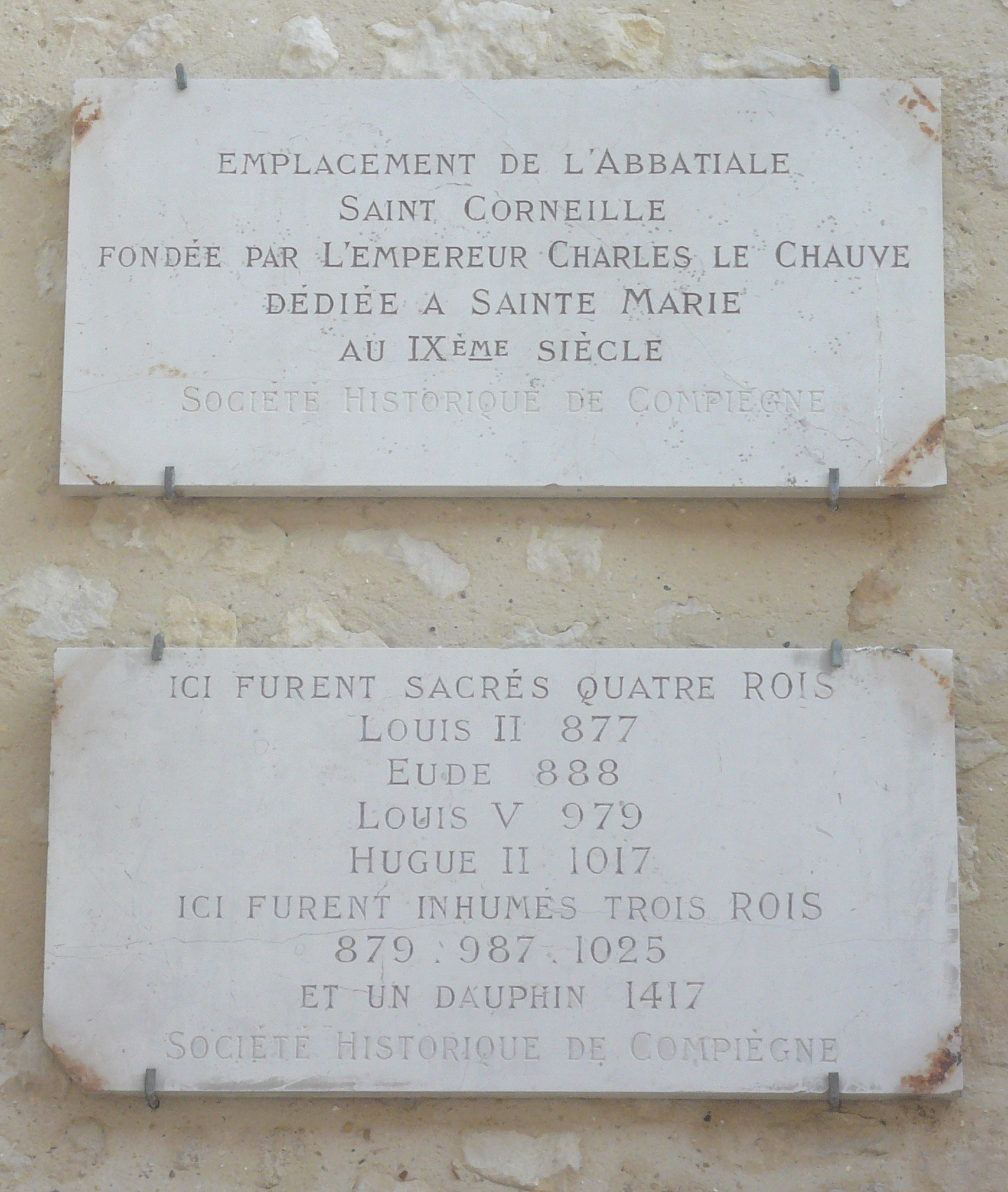 Plaque commémorative apposée à l'emplacement de la basilique Saint-Corneille à Compiègne (Oise)